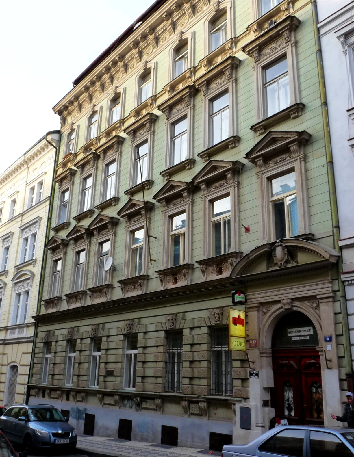 Rodný dům Carl F. Cori - Salmovská ulice v Praze